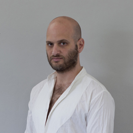 תמונה אישית של אורי גרשוני